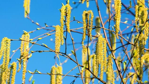 Birch perak merupakan tumbuhan monoecious